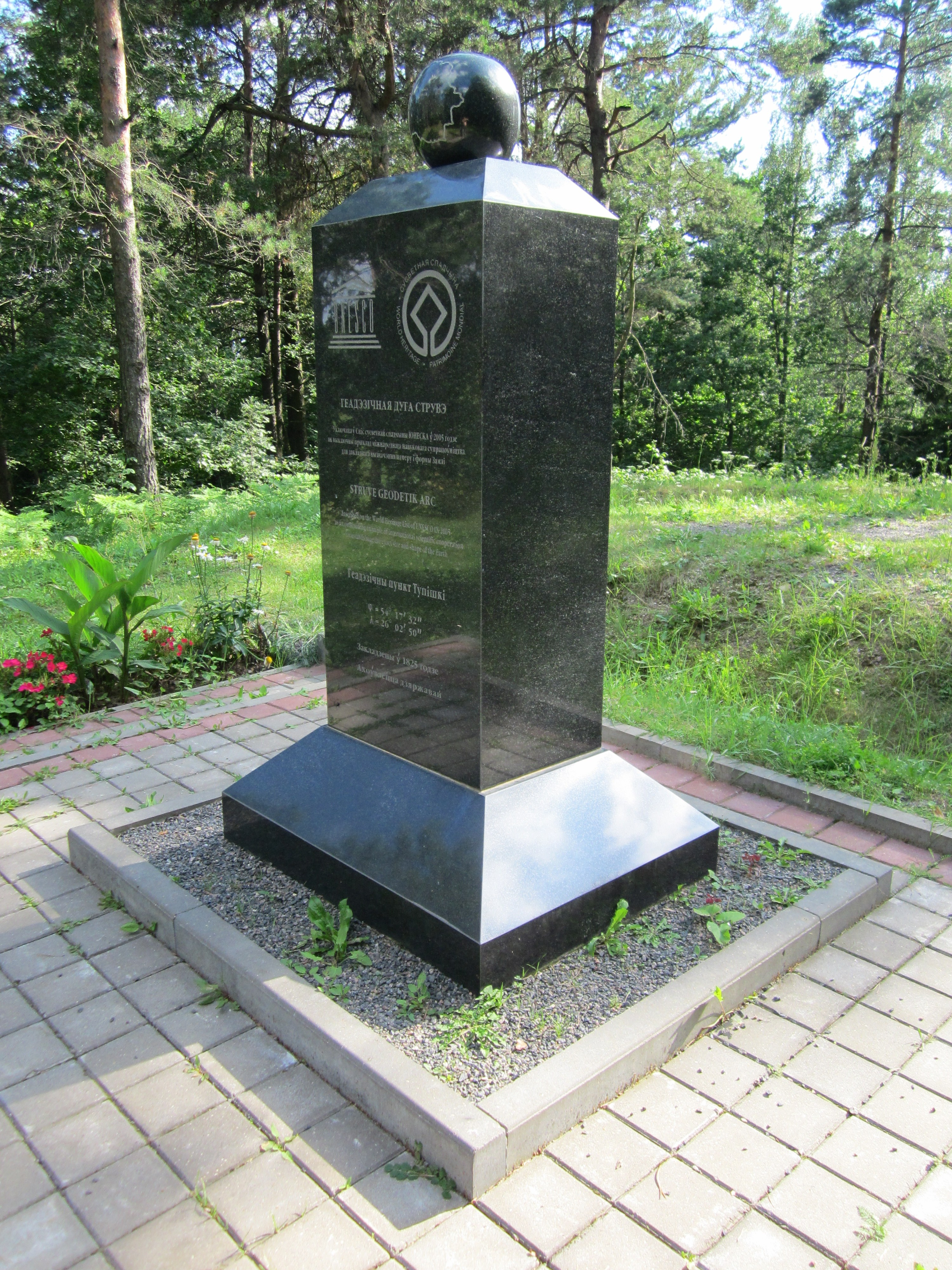 Беларуская (тарашкевіца): Геадэзічная дуга Струвэ: пункт «Іўе». в. Урцішкі This is a photo of Belarusian heritage monument. Reference number: 410Д000001-7 ( WLM)